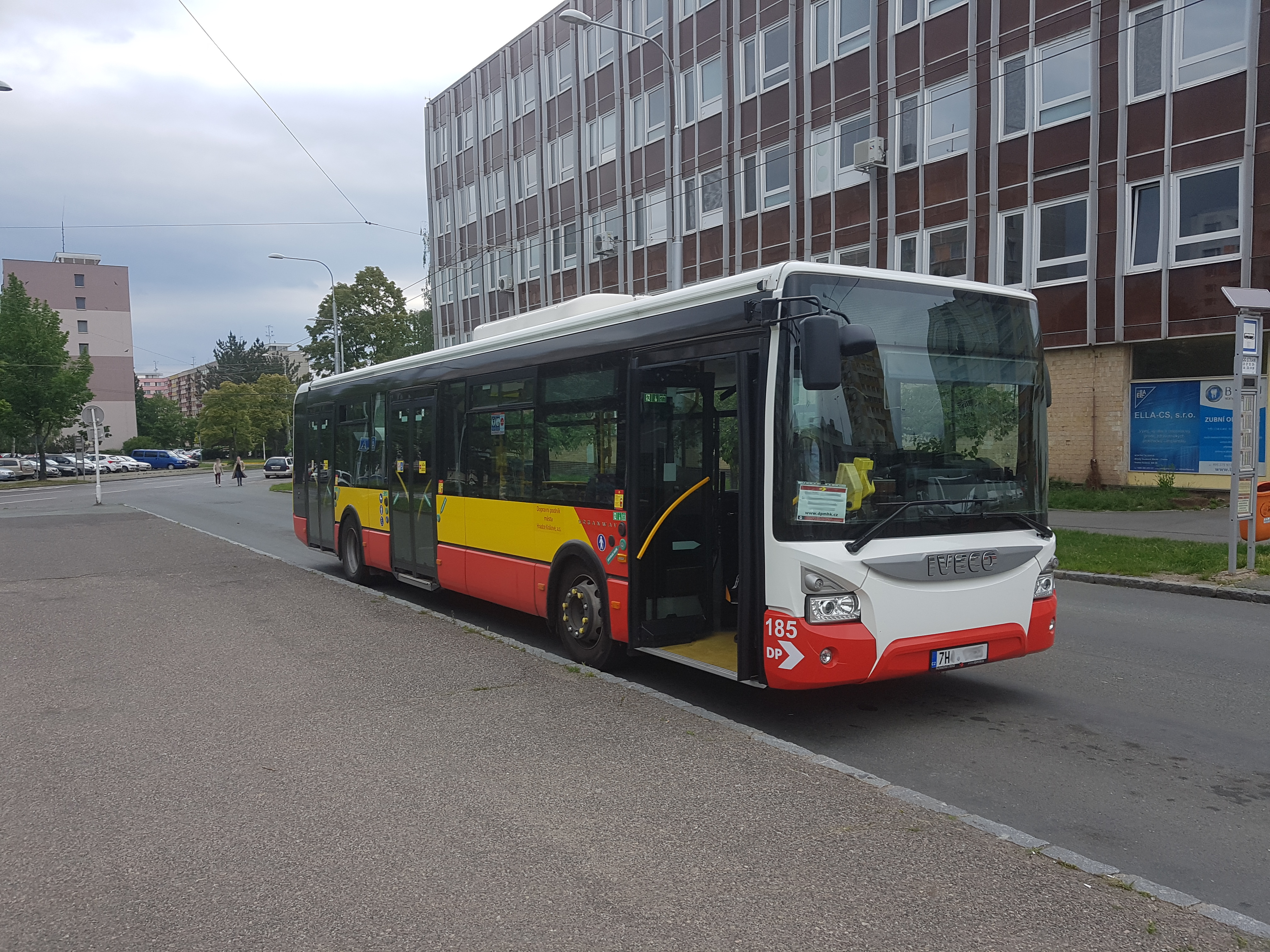 IVECO Urbanway 12M Dopravního podniku města Hradce Králové